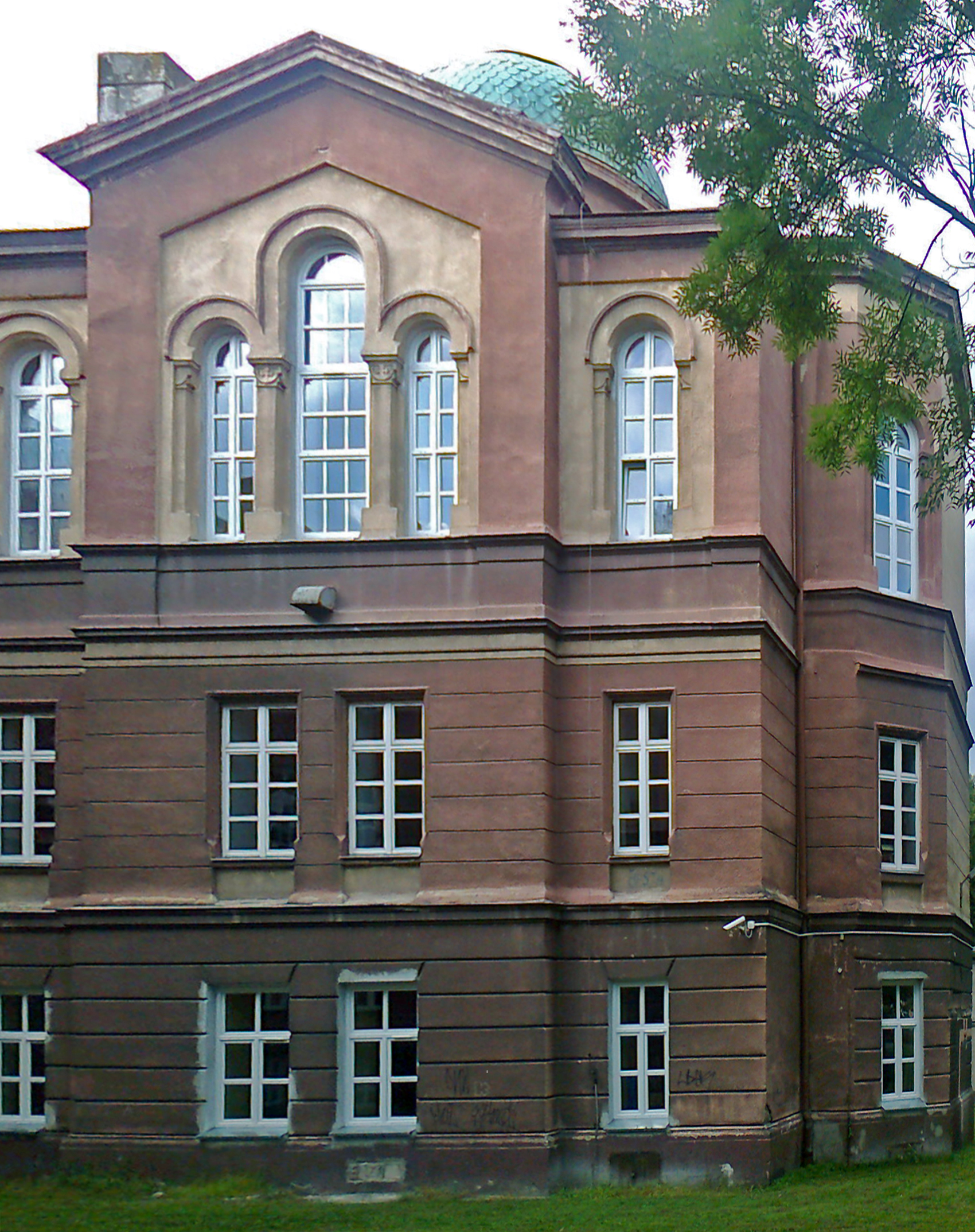 Dawna kaplica św. Leoncjusza w budynku prawosławnego seminarium duchowego w Chełmie, dziś część gmachu I LO w Chełmie